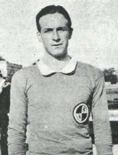 Alberto Machimbarrena en 1915 con la Selección regional del Centro (Castilla - Madrid)